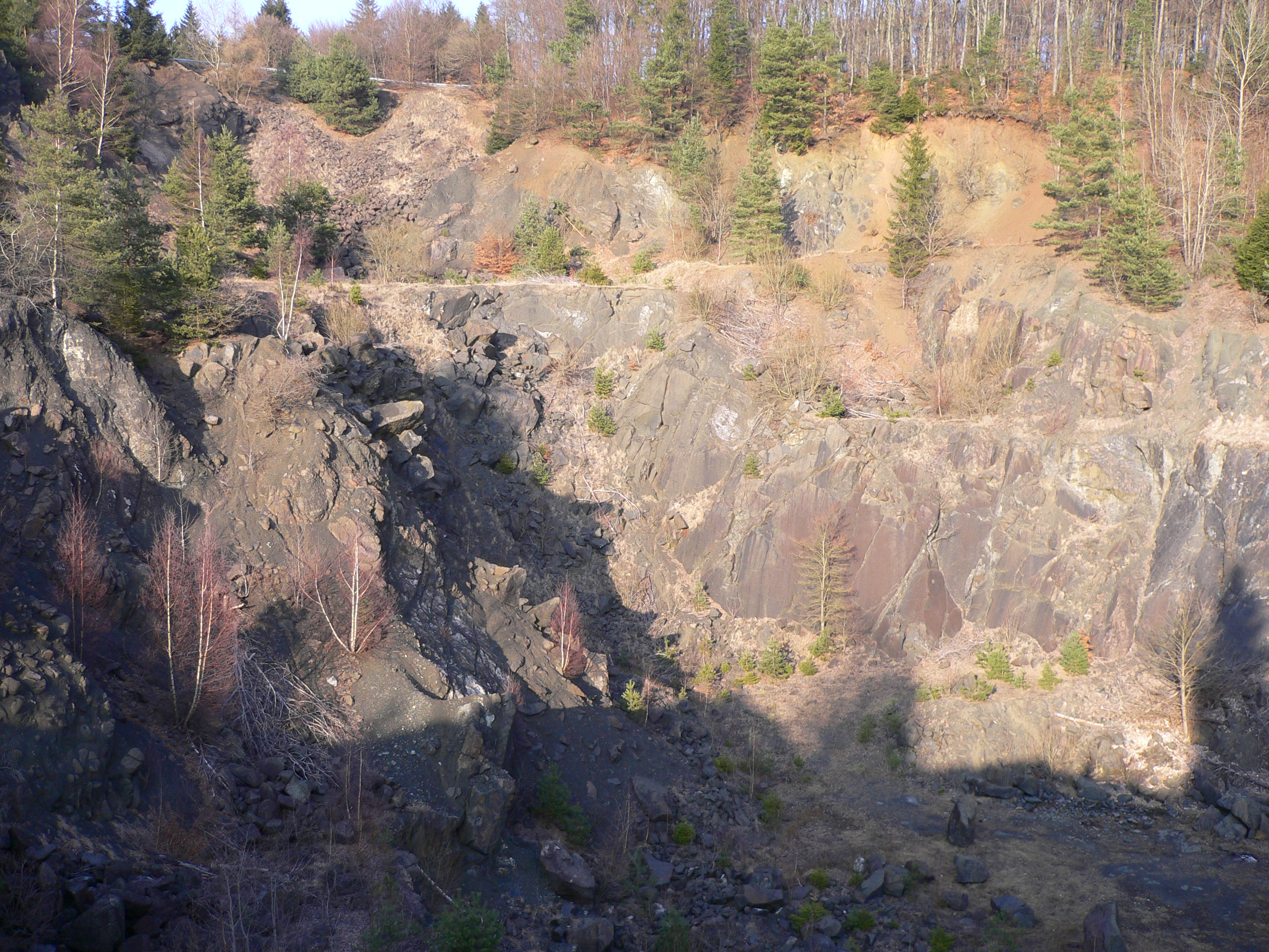 Aufgelassener Diabas-Steinbruch bei Gladenbach-Rachelshausen